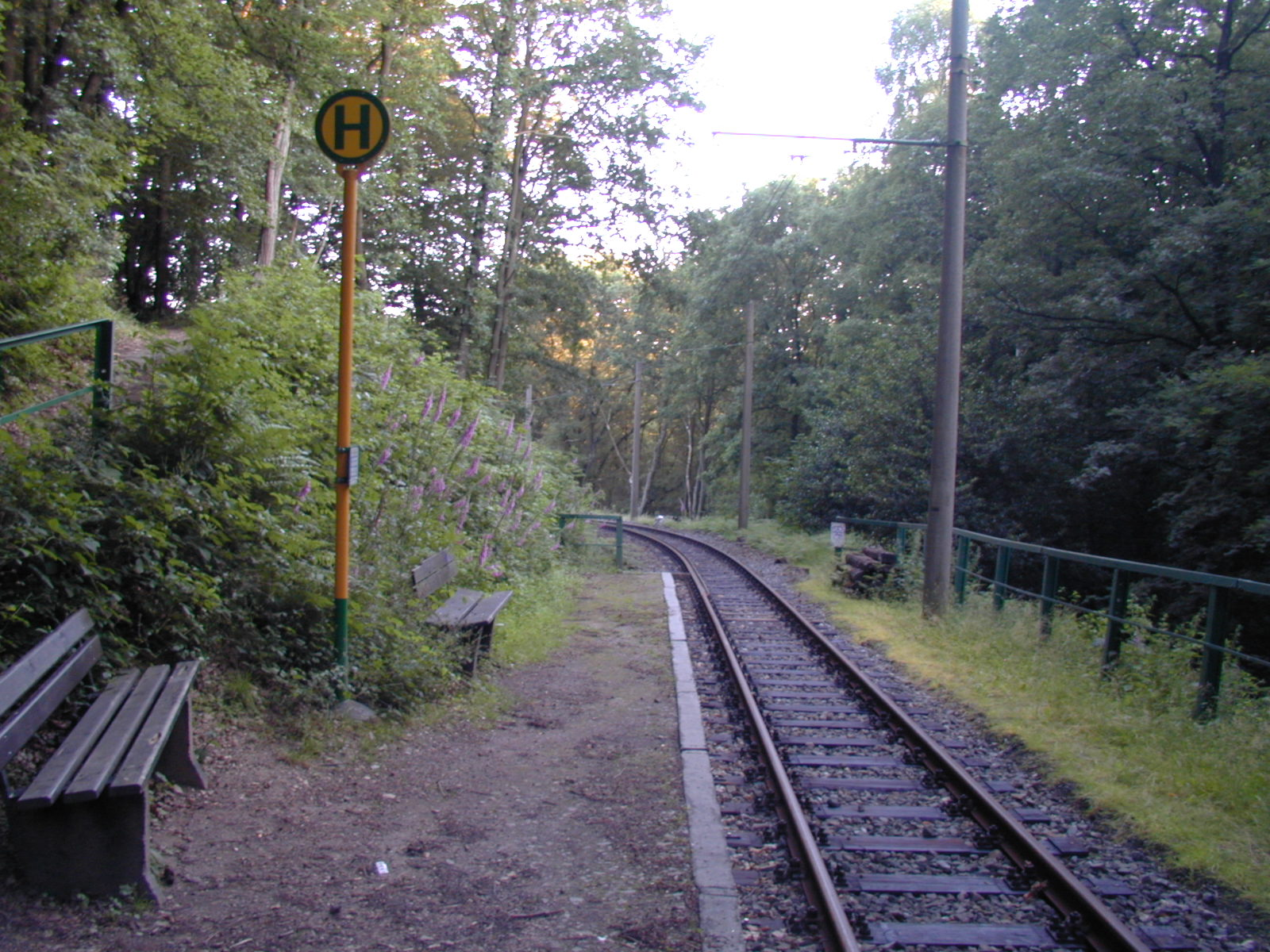 Haltestelle der Museumsbahnstrecke der Bergischen Museumnsbahnen im Burgholz, Wuppertal 2001 selbst fotografiert